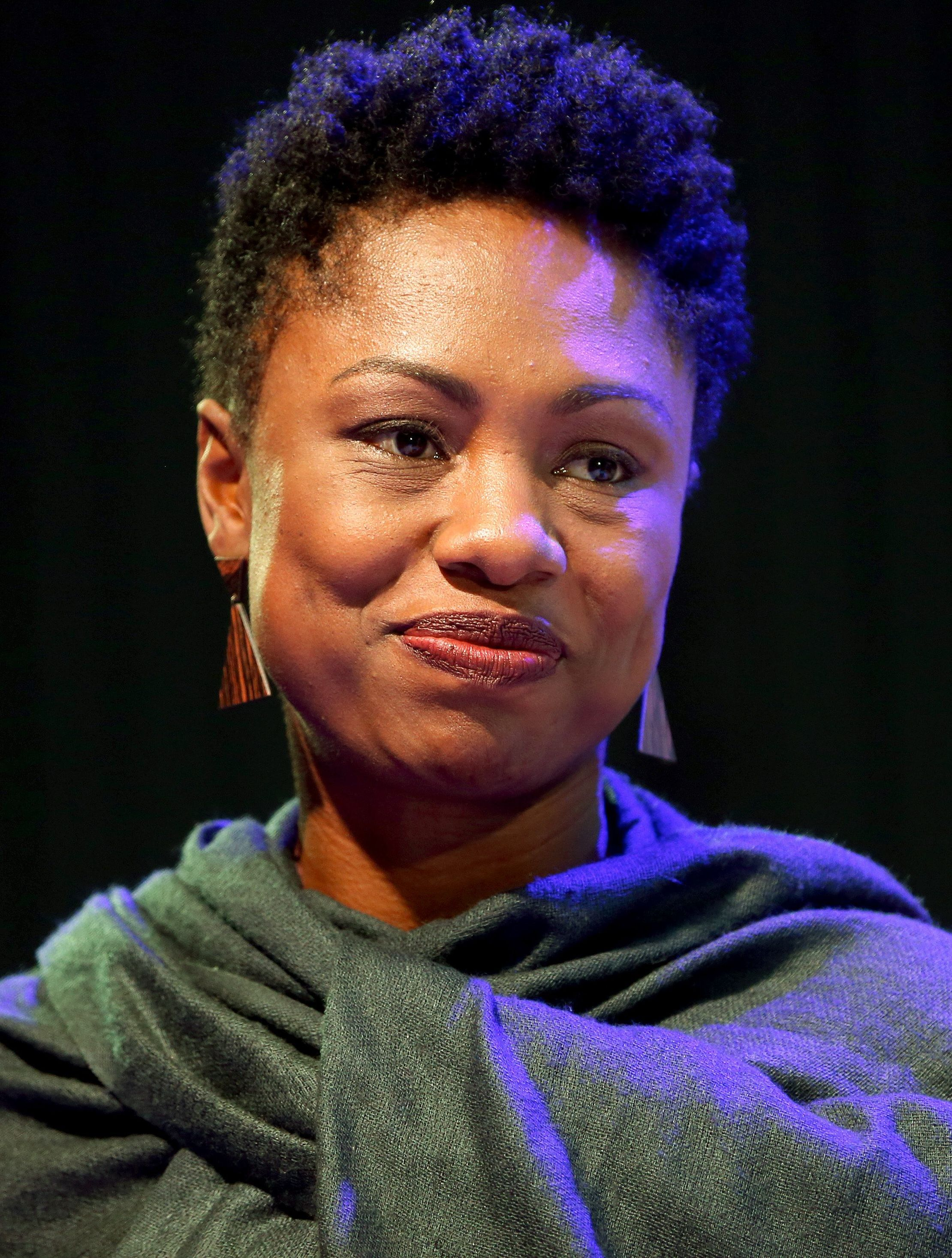 Brasília - A artista visual, pesquisadora e docente Renata Felinto participa da mesa de discussão Arte e protesto, no quarto dia do Festival Latinidades 2016 (Wilson Dias/Agência Brasil)